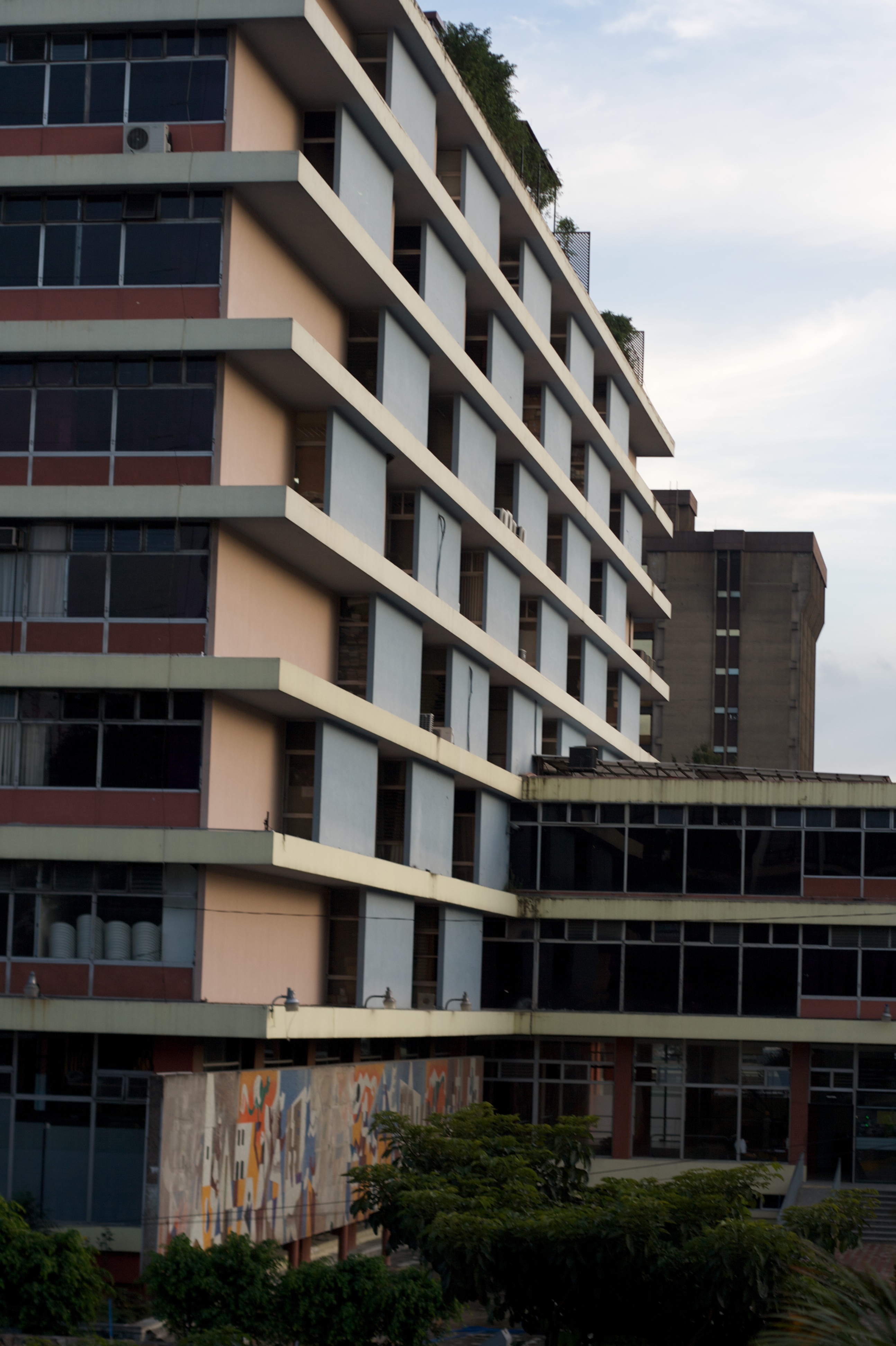 parte lateral del edificio del IGSS